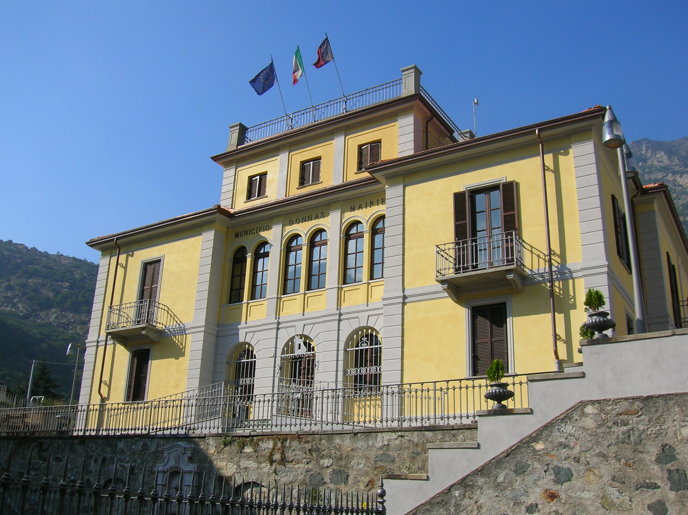 Municipio di Donnas, Valle d'Aosta, Italia.